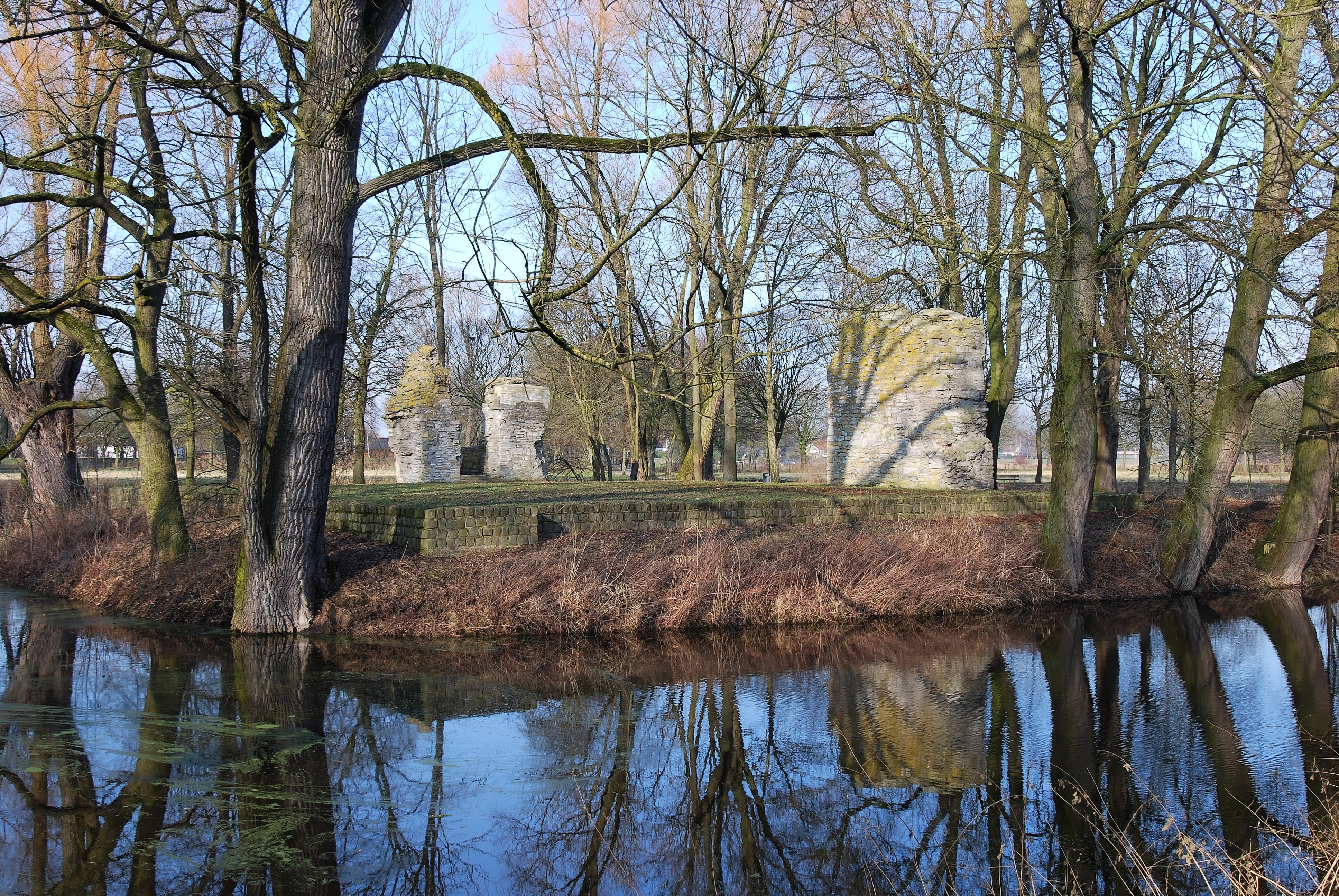 Burg Lipperode an der Straße In den Amtswiesen im Stadtteil Lipperode in der Stadt Lippstadt im Kreis Soest in Nordrhein-Westfalen; Das Gebiet, in dem sich der Burgrest befindet, ist als Denkmalschutzgebiet ausgewiesen.